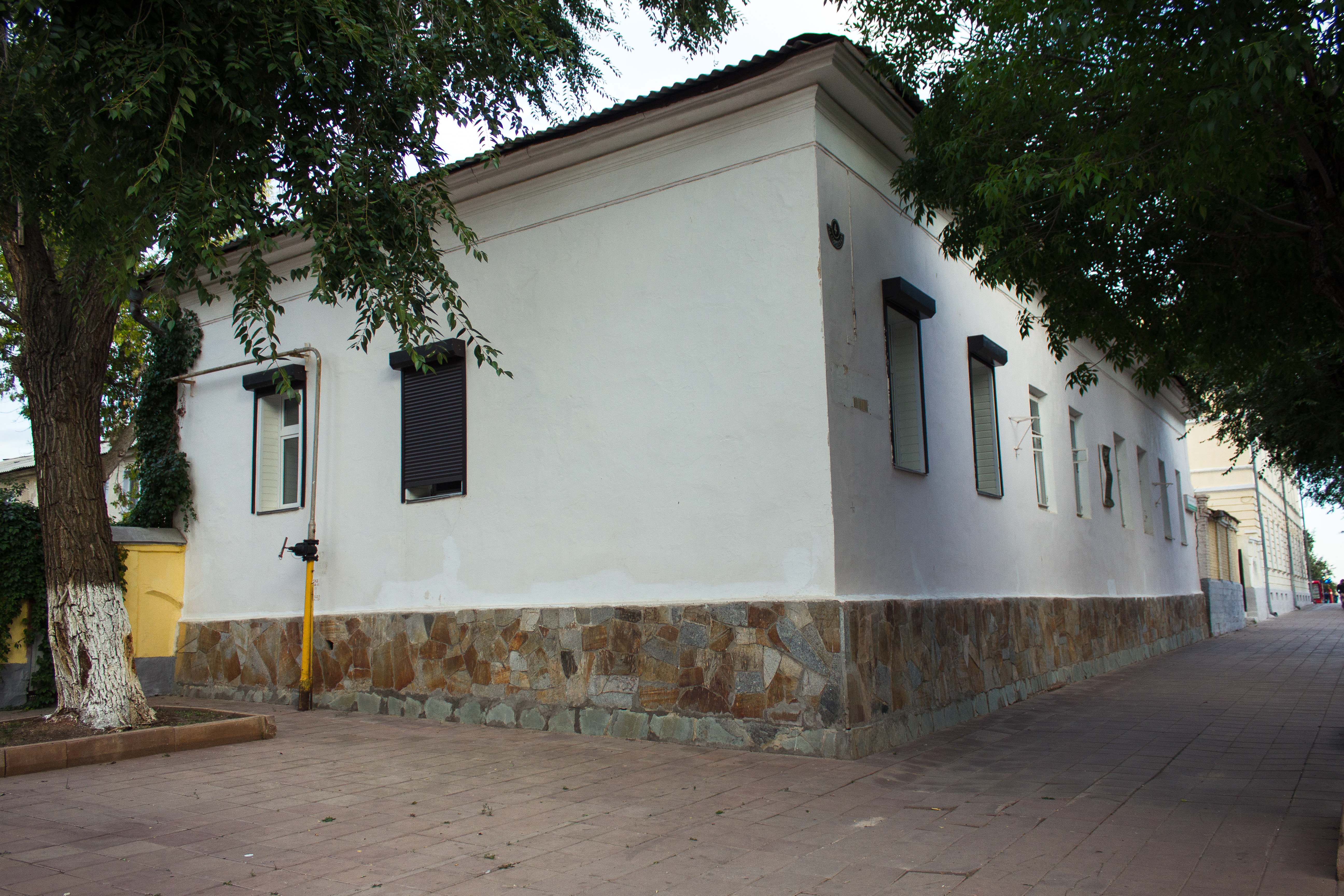 Дом, в котором в 1753-1767 гг. жил исследователь Оренбургского края первый член-корреспондент Петербургской Академии наук П. И. Рычков: улица Советская, 4, Оренбург, Оренбургская область